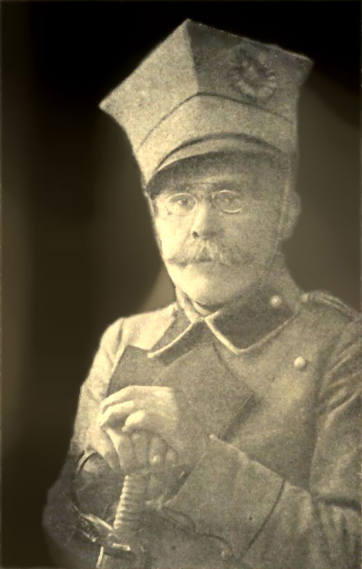 Wacław Sieroszewski